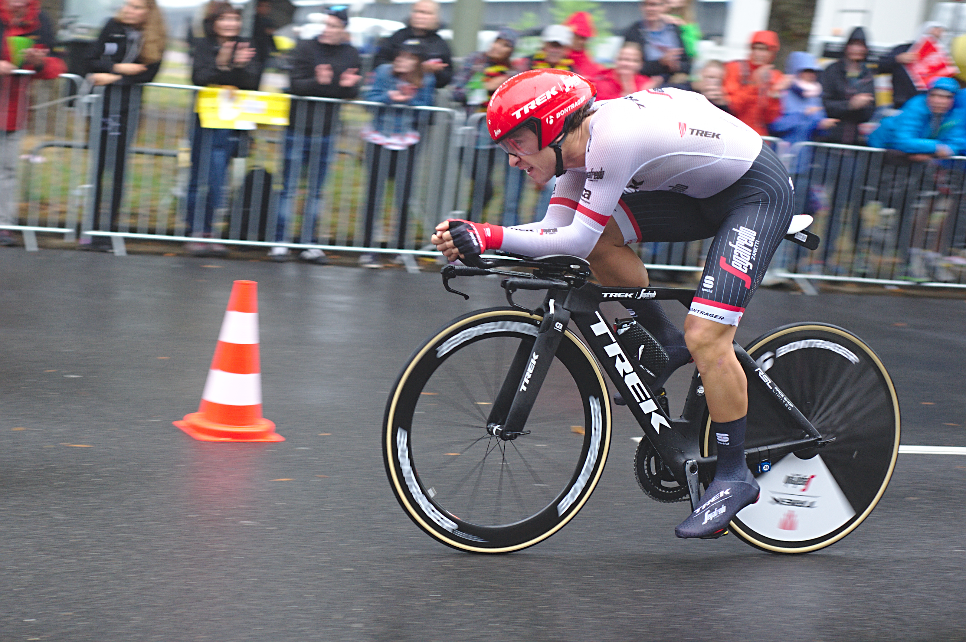 Einzelzeitfahren beim Grand Départ in Düsseldorf, Tour de France 2017: Fabio Felline (Trek-Segafredo)